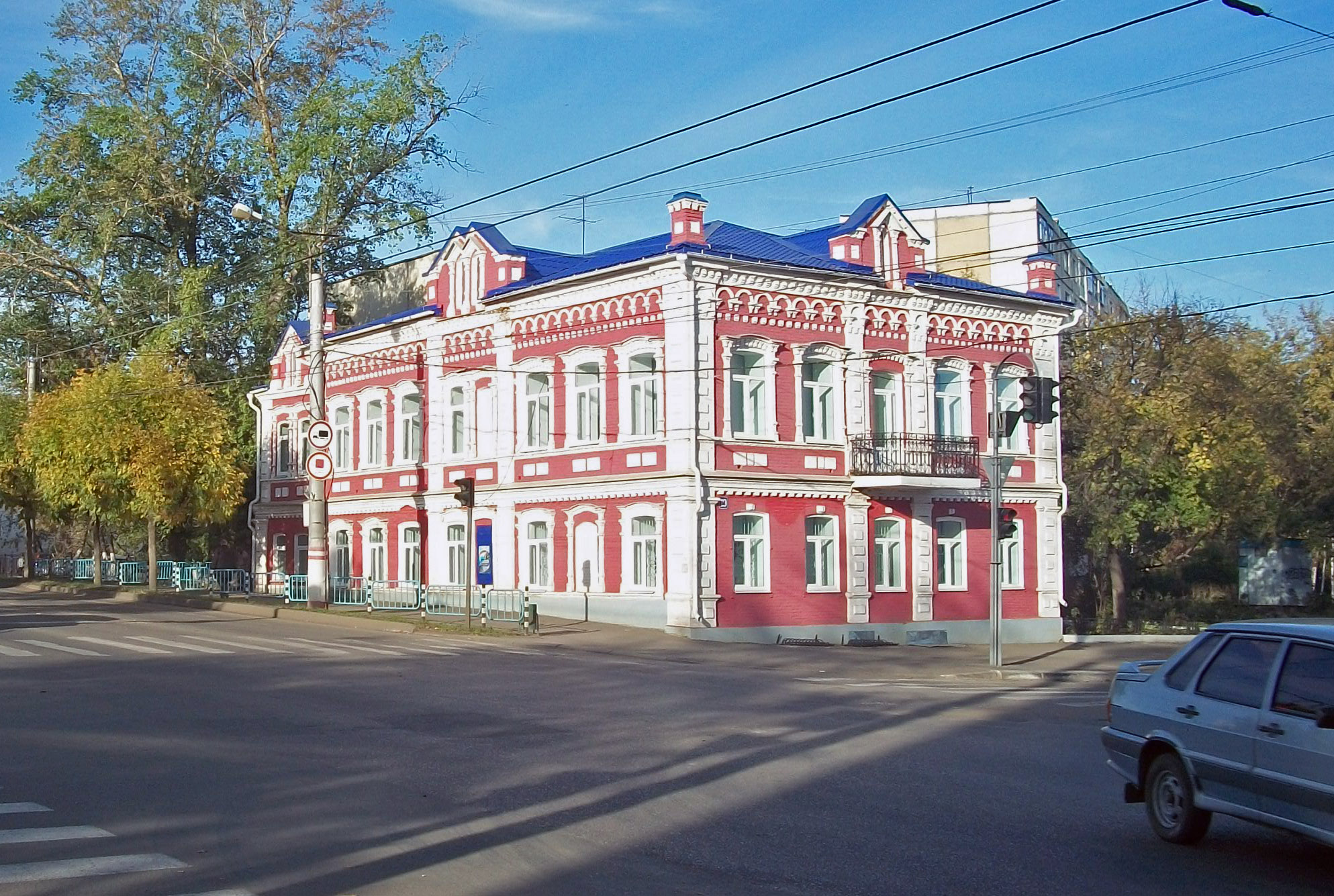 Музей мордовской культуры в Саранске